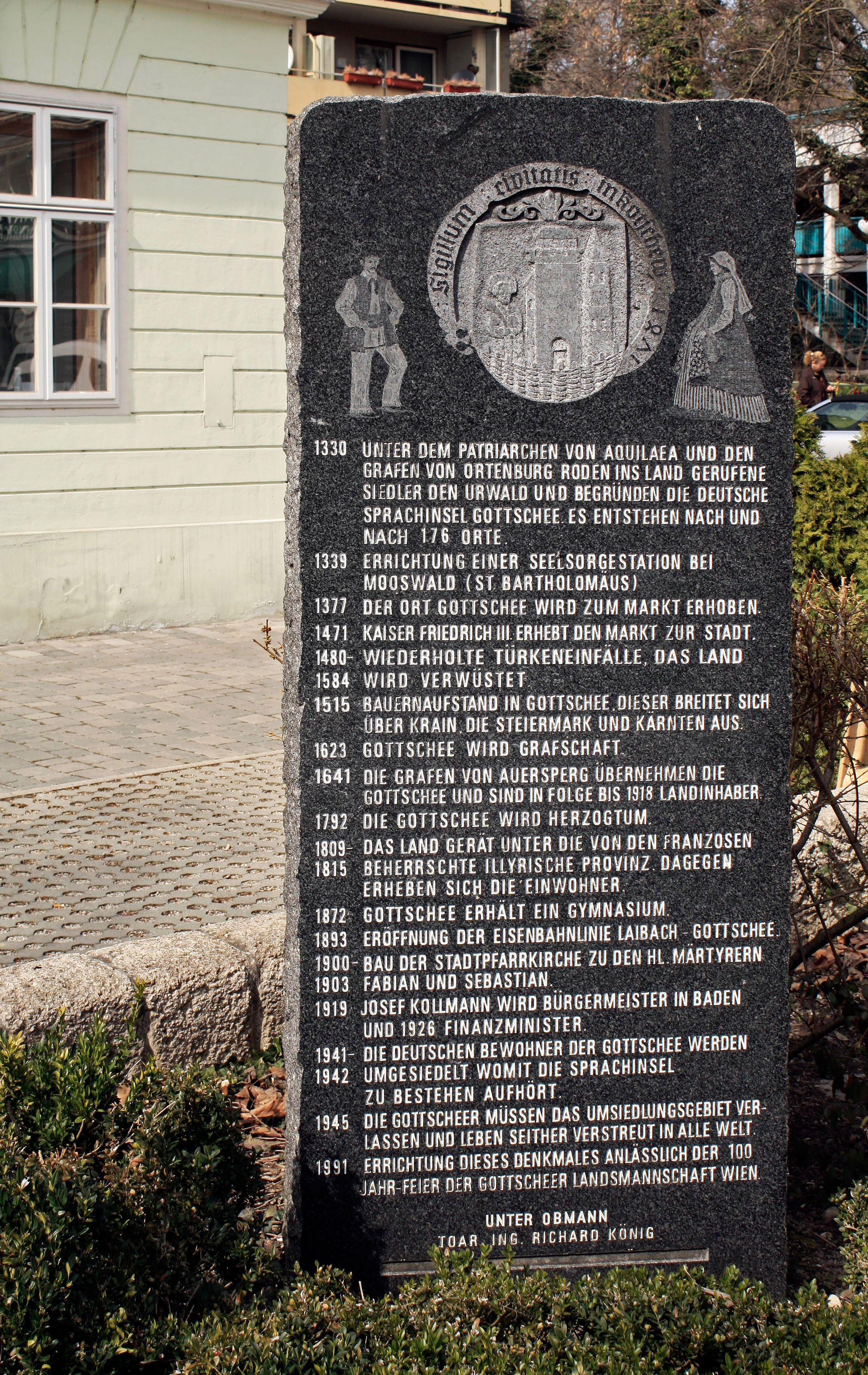 Gottscheer-Denkmal in Baden